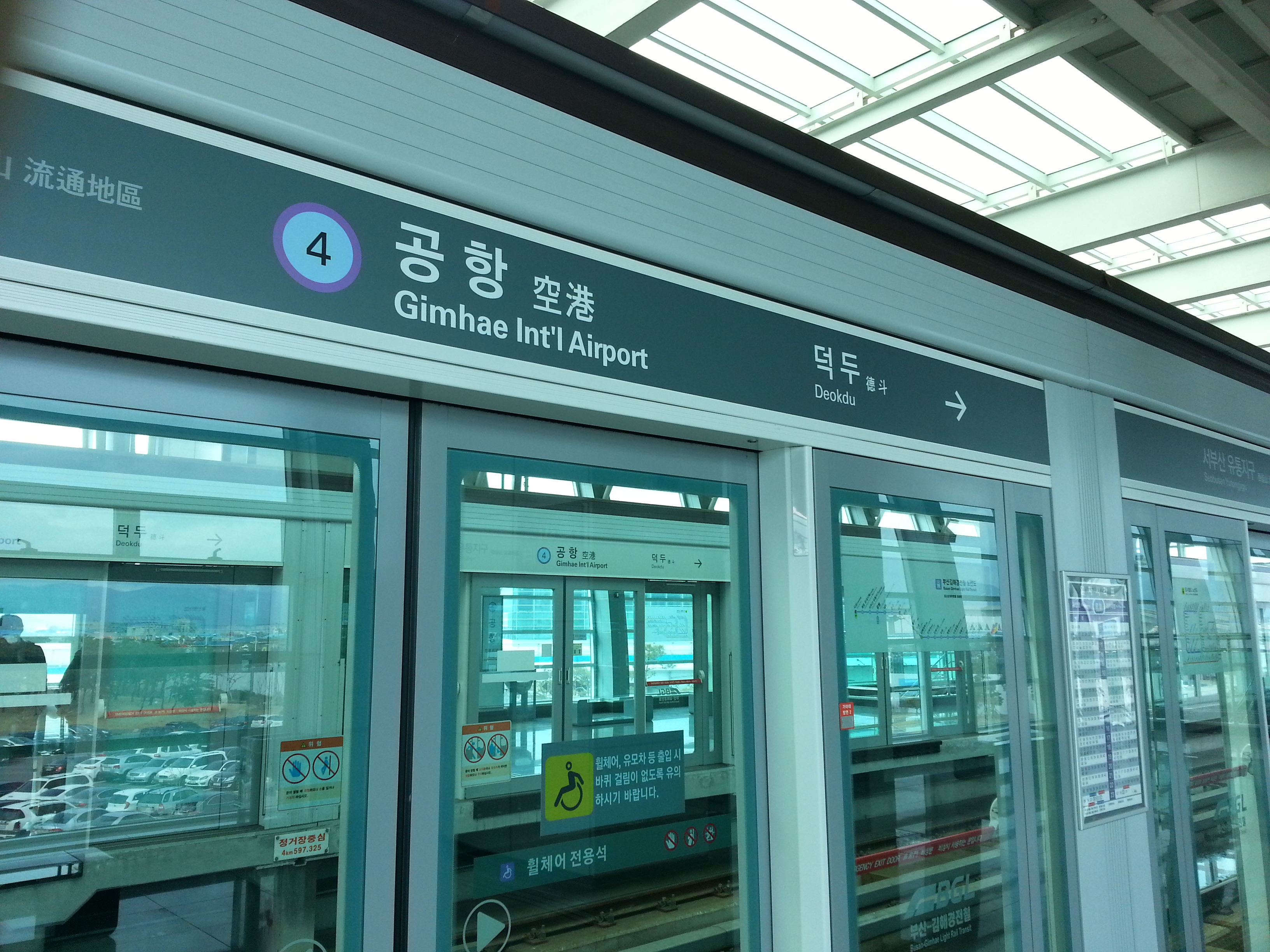 釜山－金海軽電鉄空港駅ホームドア